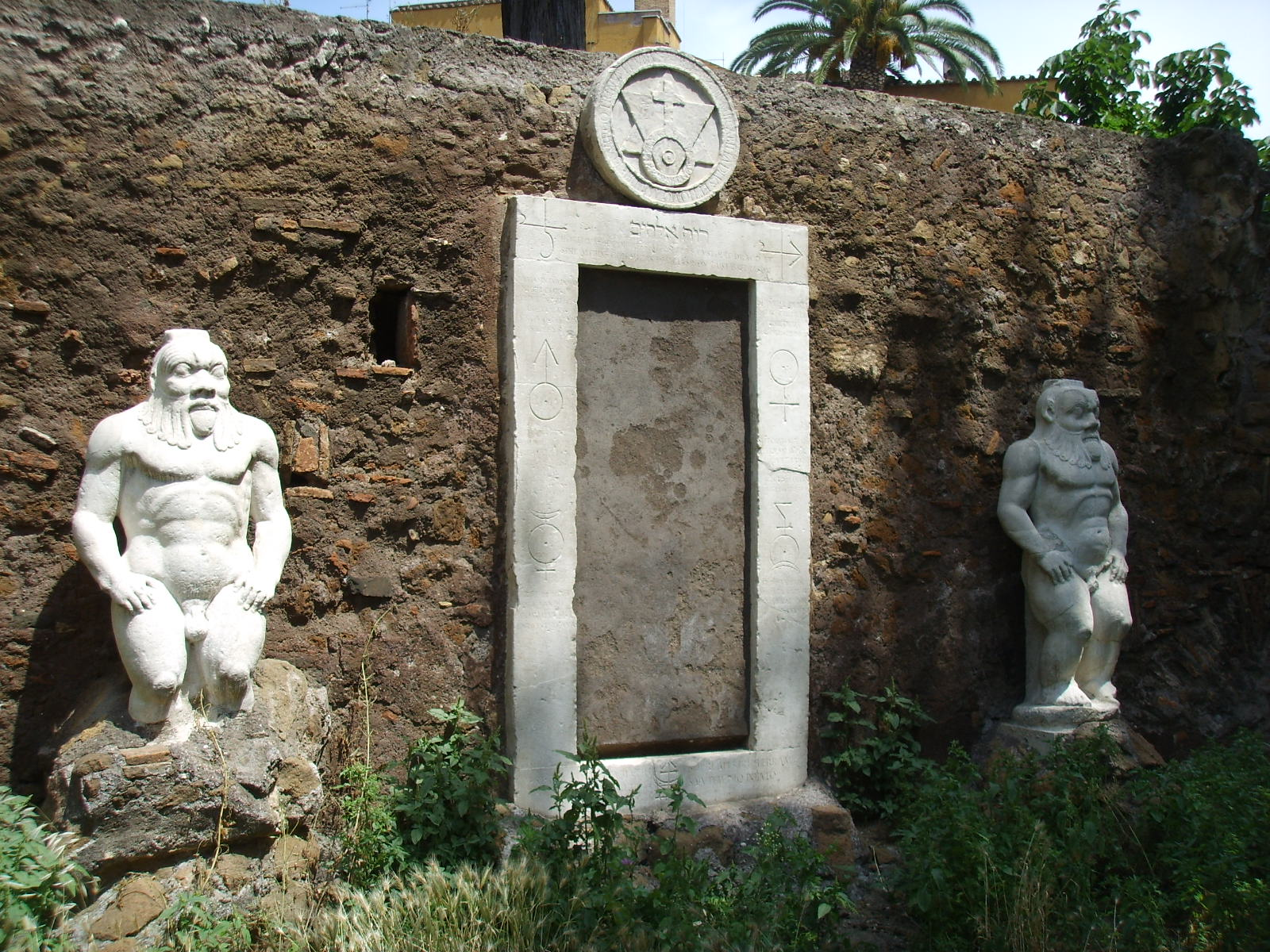 Magic gate (Porta magica) in Piazza Vittorio Emanuele, in Rome, Italy